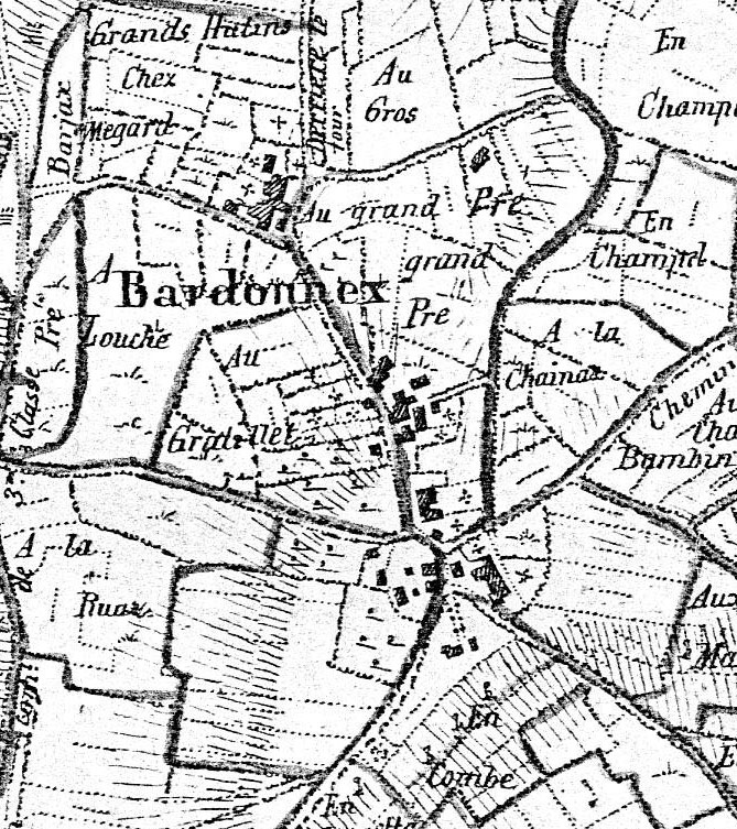 Bardonnex dans le canton de Genève, détail de la carte « Mayer » de 1830.